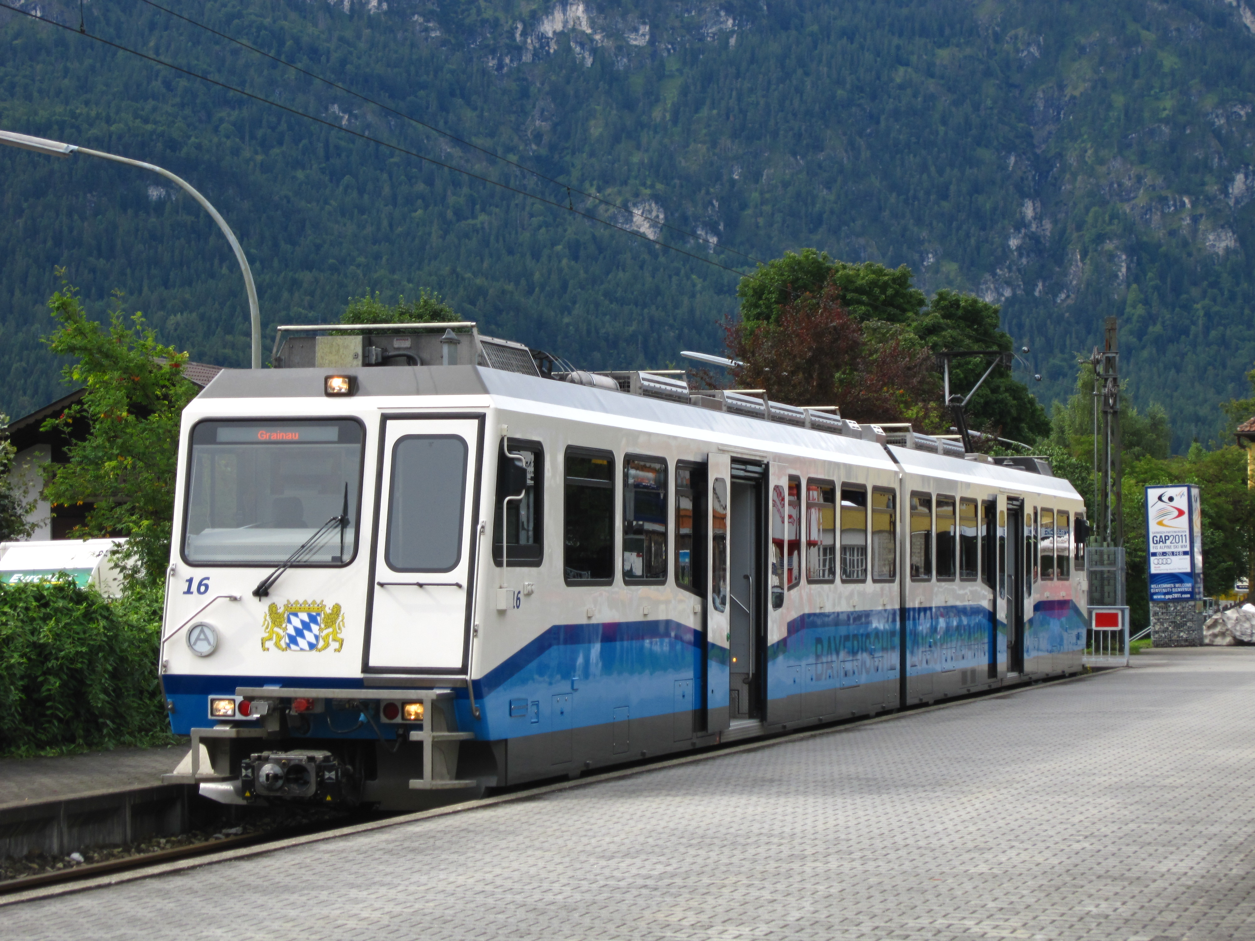 Der Triebwagen wartet im Bahnhof Garmisch auf Fahrgäste.